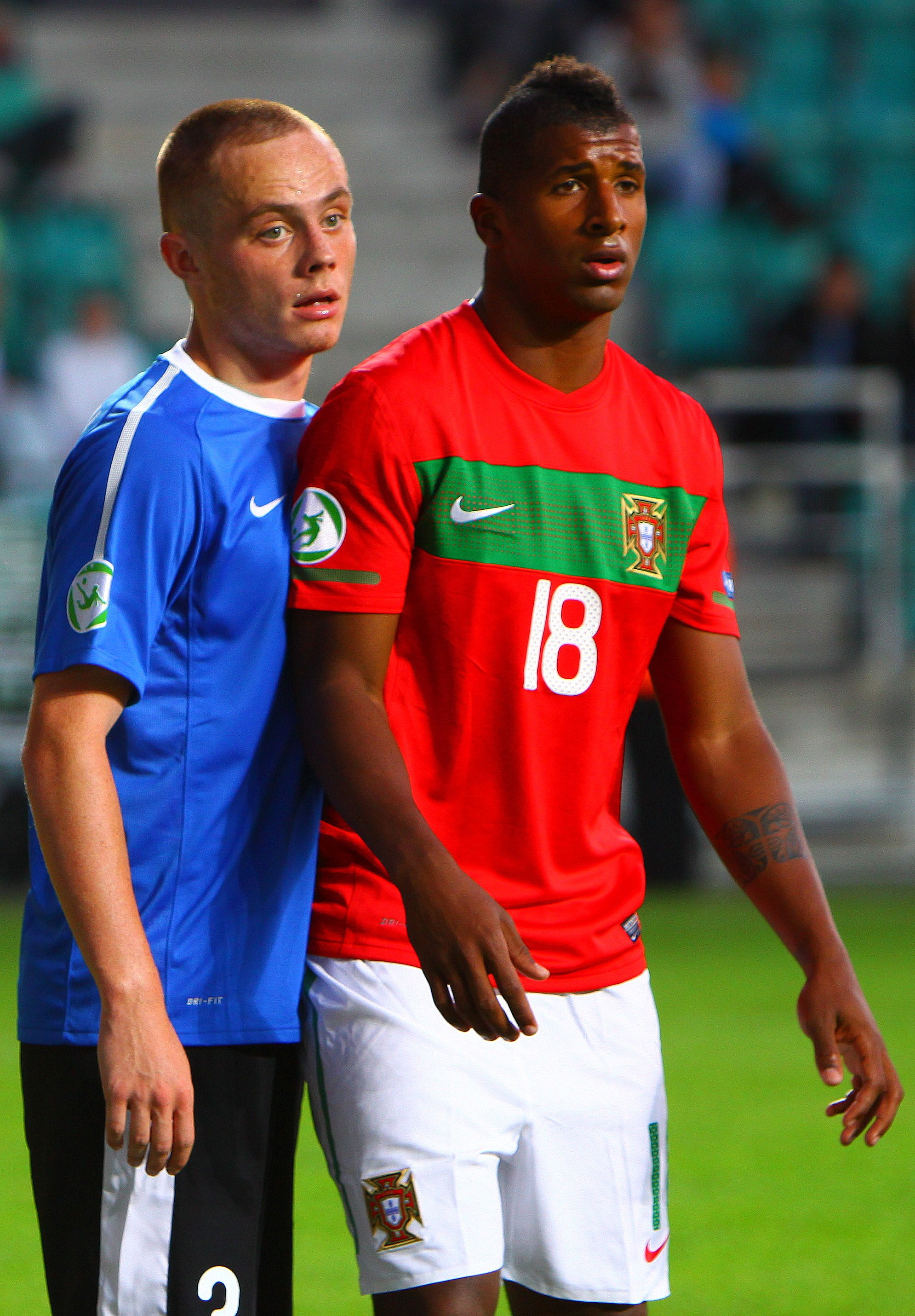 U-19 Estonia vs Portugal.